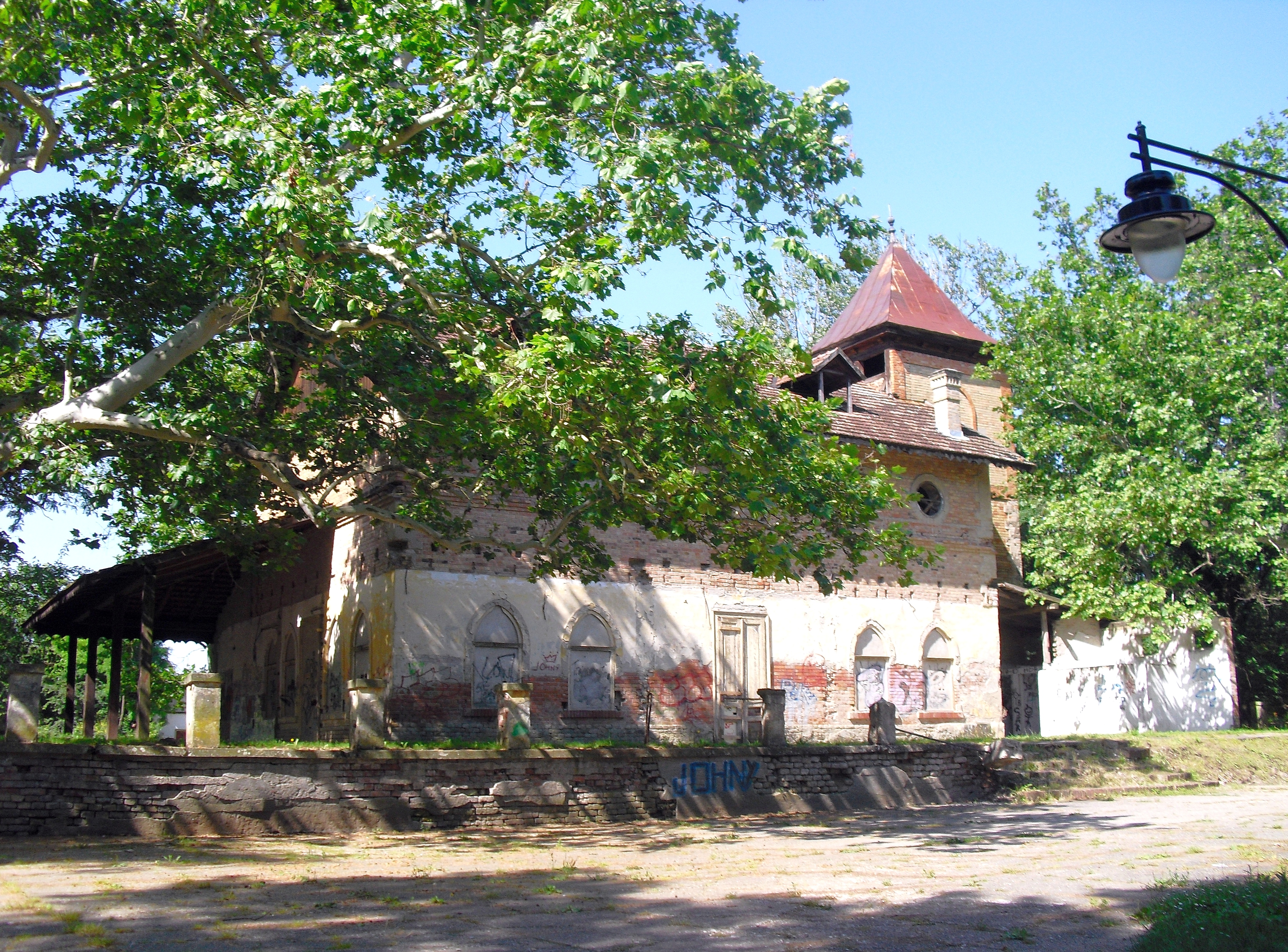 Кафана Вигадо у парку бање Кањижа,Народни парк бб...